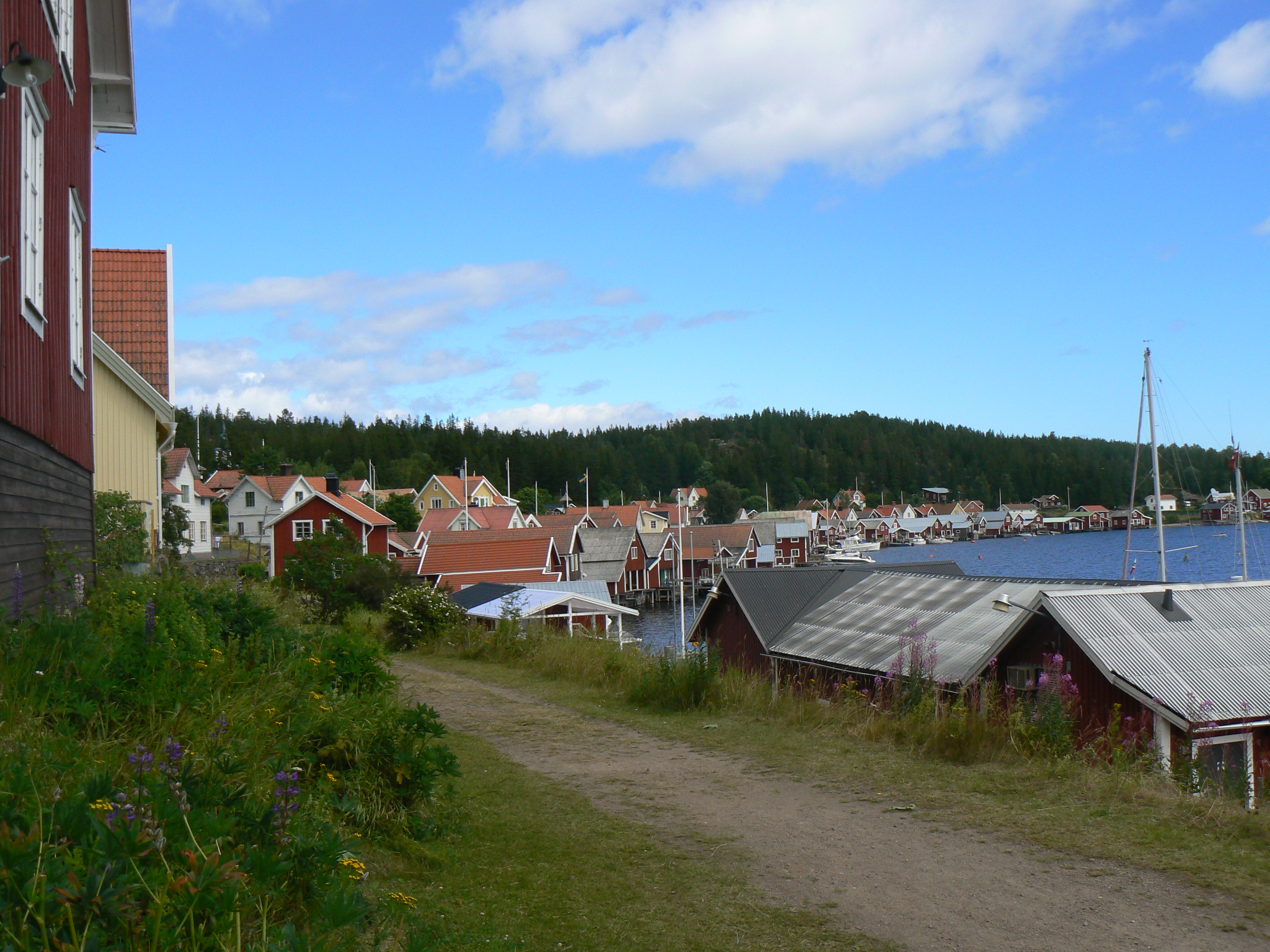 Ulvöhamn, village in Ulvön island in Ångermanland, Sweden